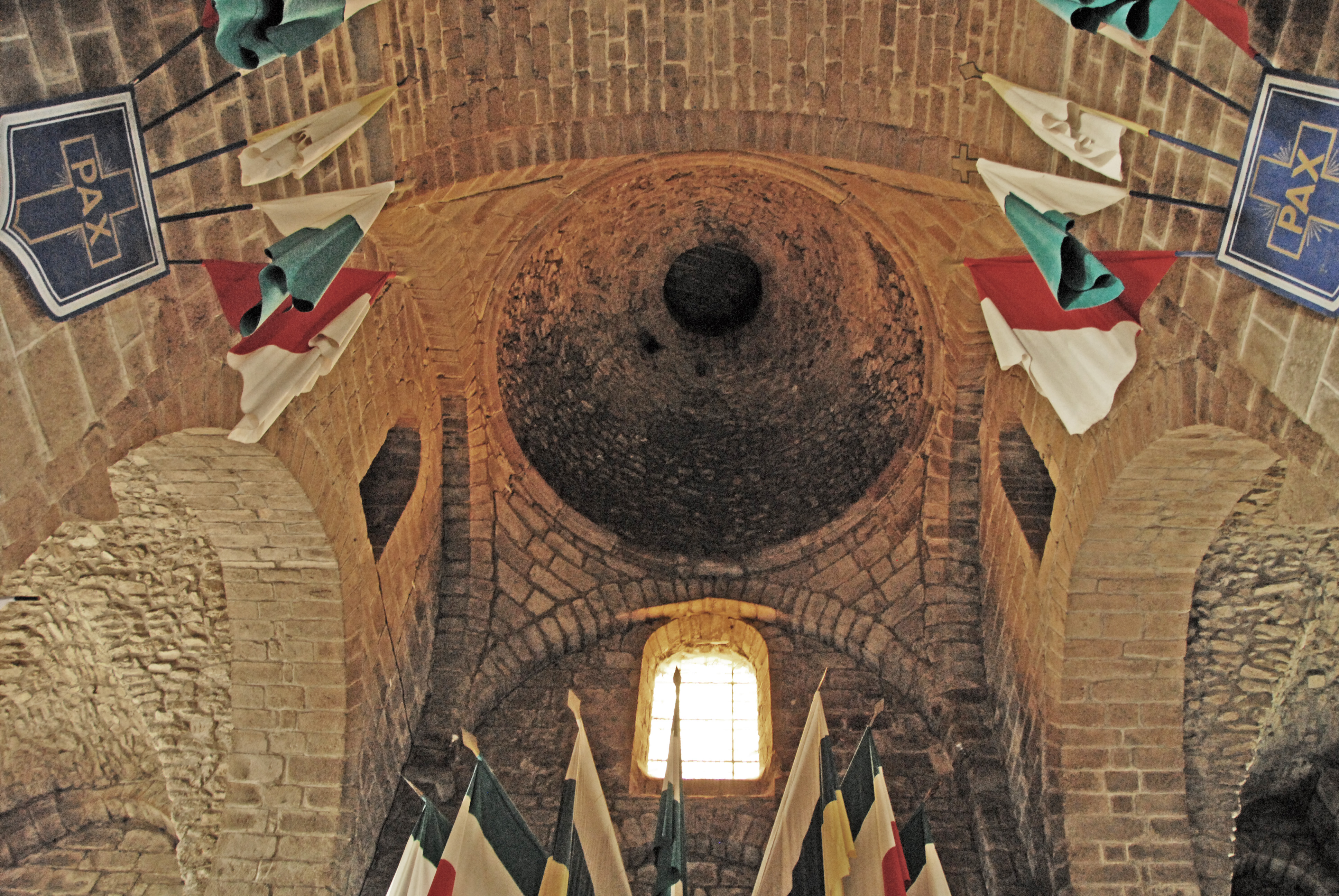 St-Junien, Langhaus, Joch 1, Pendentifkuppel